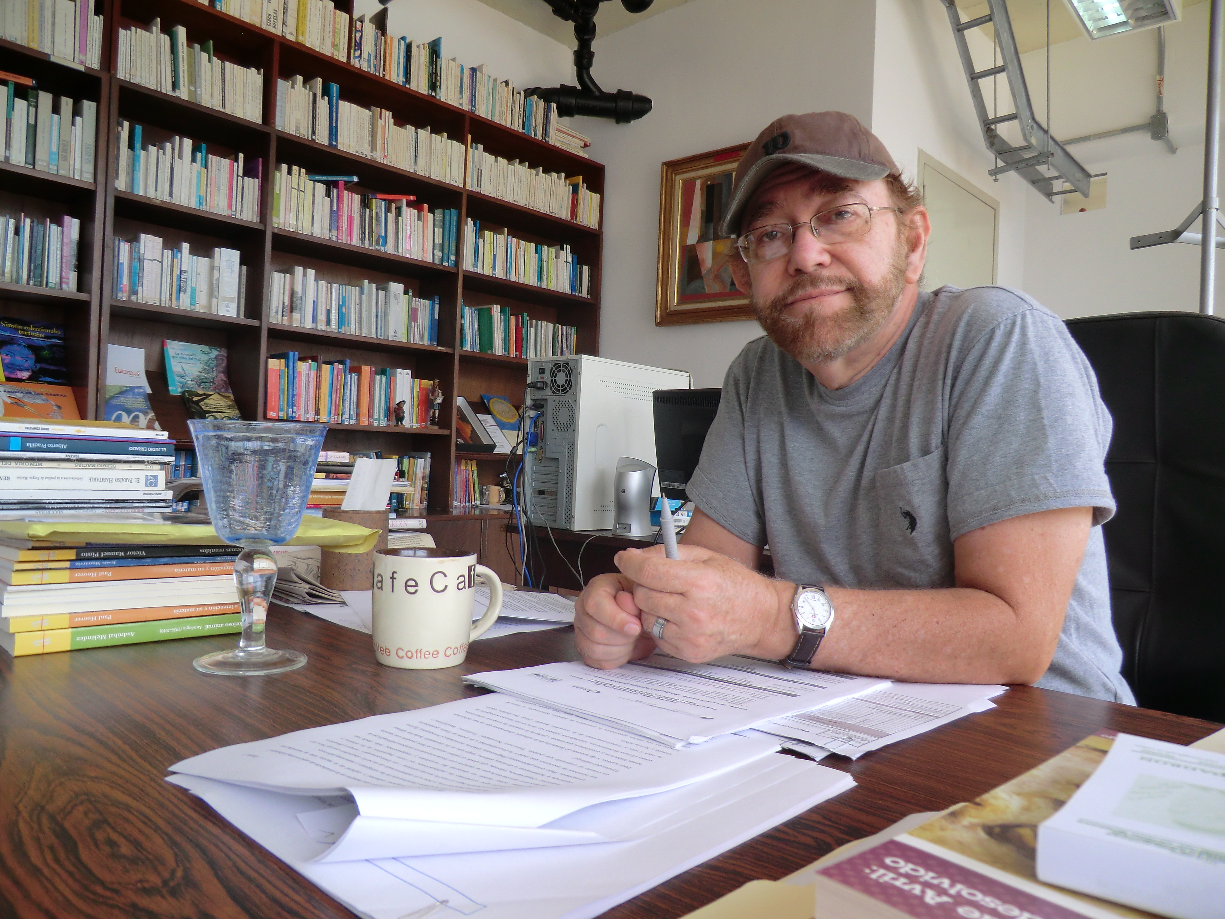 El escritor venezolano Carlos Noguera en su despacho como presidente de Monte Ávila Editores.